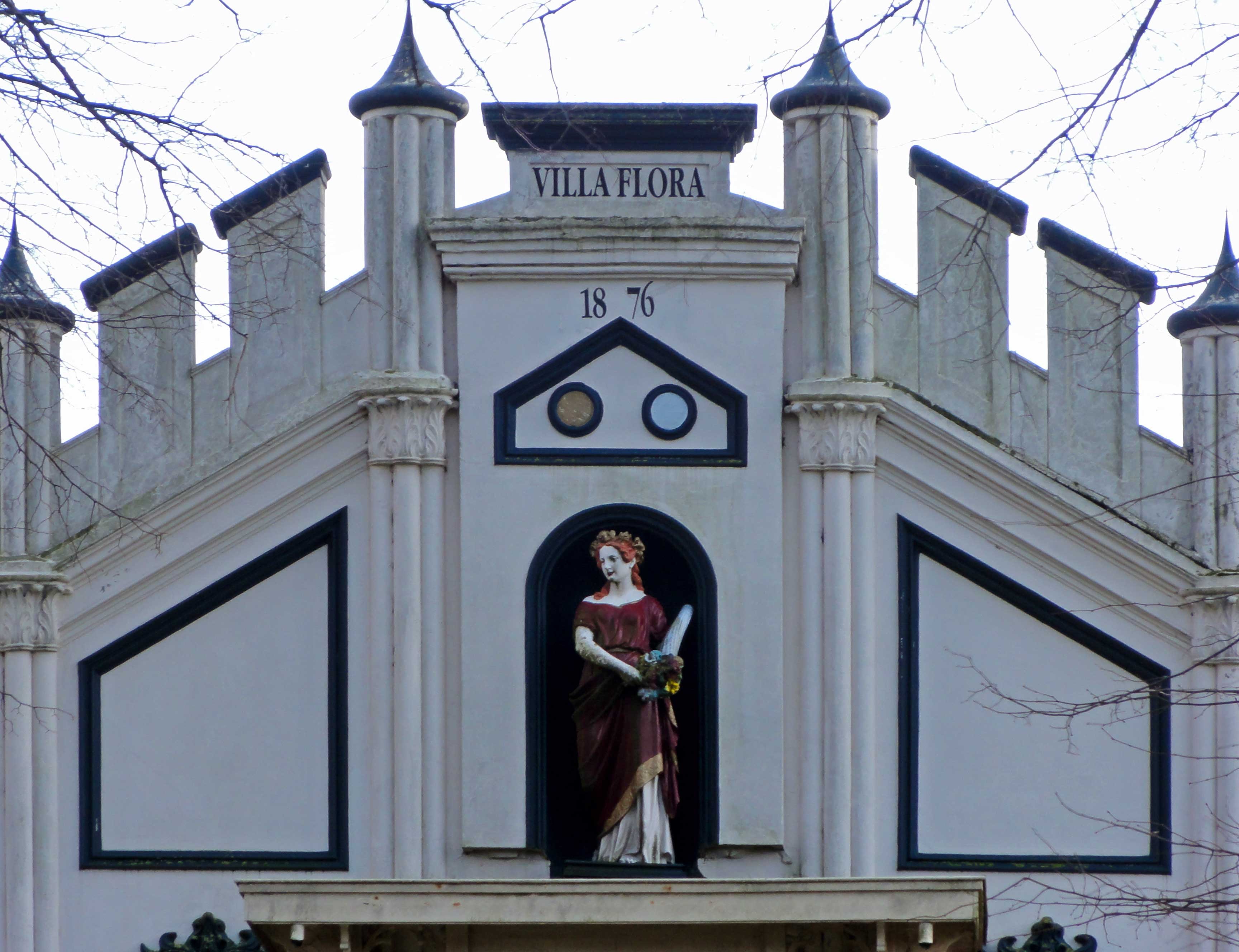 Geveldetail van de villa Flora aan het Zuiderdiep in Nieuw-Buinen